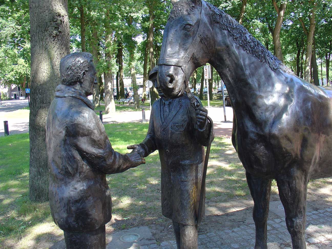 Zuidlaardermarktmonument, beeld van de beeldhouwer Frans Ram